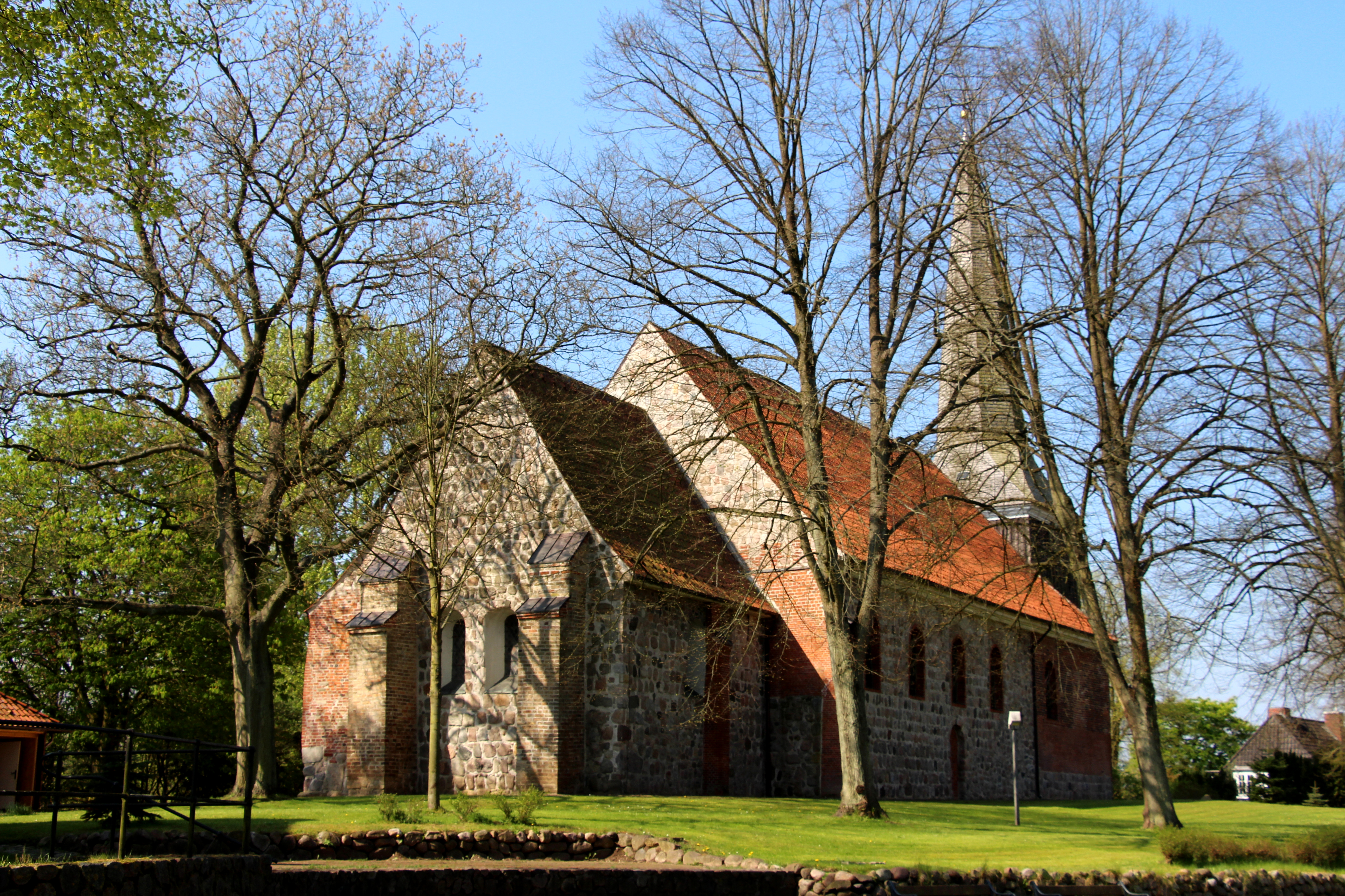 St. Johanniskirche in Brügge